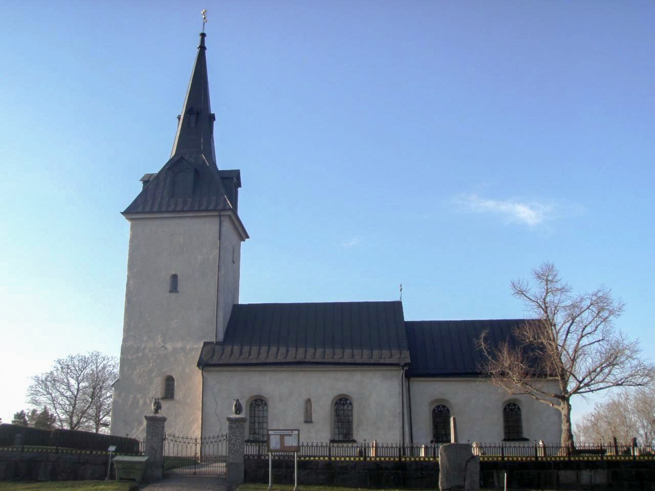 Furingstads kyrka